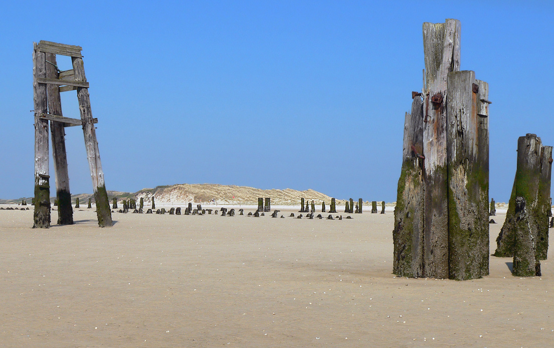 Reste des Ostanlegers auf Wangerooge